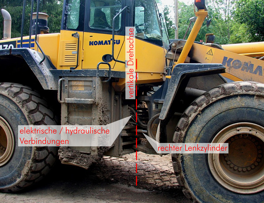 Beschriftete Version von Bild:2007-06-27 Komatsu WA 470 Radlader mit Knicklenkung (kl).JPG (Original text : Komatsu WA 470 – Radlader mit Knicklenkung)